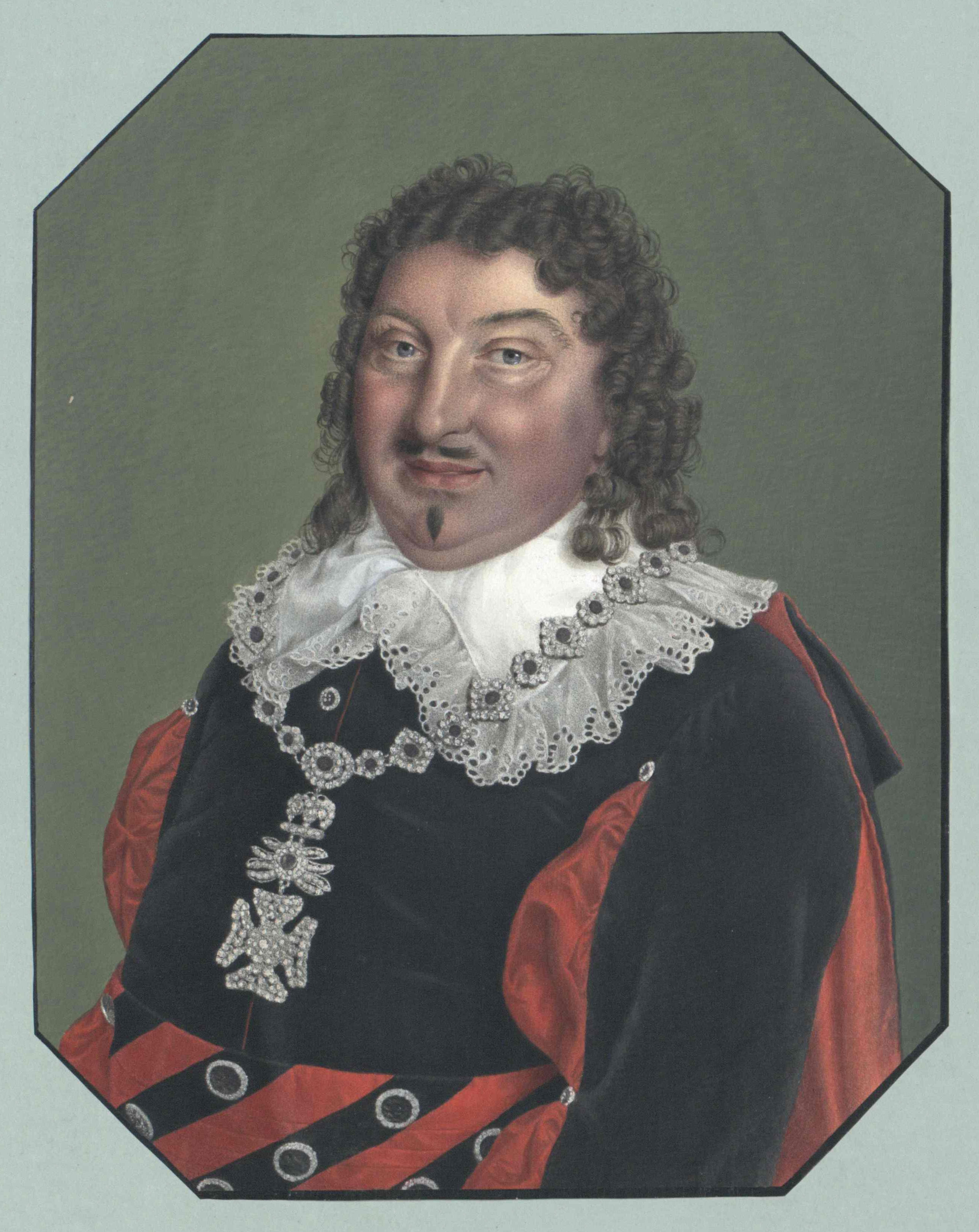 C. Krüger als Graf Almaviva in dem Lustspiele die beyden Figaro (Karl Friedrich Krüger als Graf Almaviva in Die beiden Figaro von Johann Friedrich Jünger nach Honoré François Richaud de Martelly, gegeben u. a. am Wiener Burgtheater), koloriert Wien, Österreichische Nationalbibliothek, Bildarchiv und Grafiksammlung, Porträtsammlung, Inventar-Nr. PORT_00147261_01